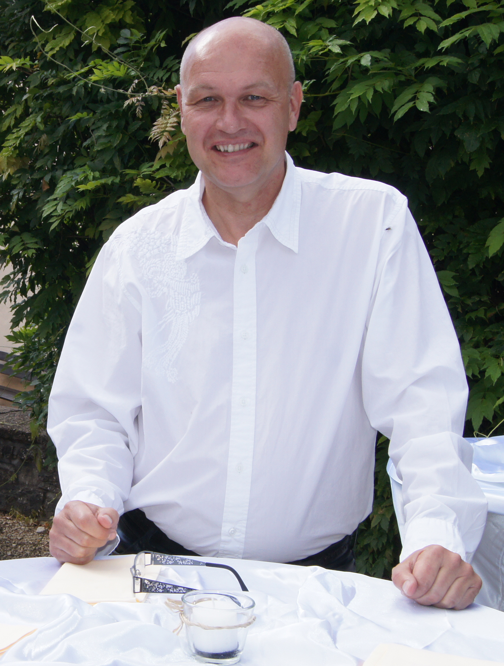 Der deutsche Musikproduzent, Texter und Komponist Levon Thomas.